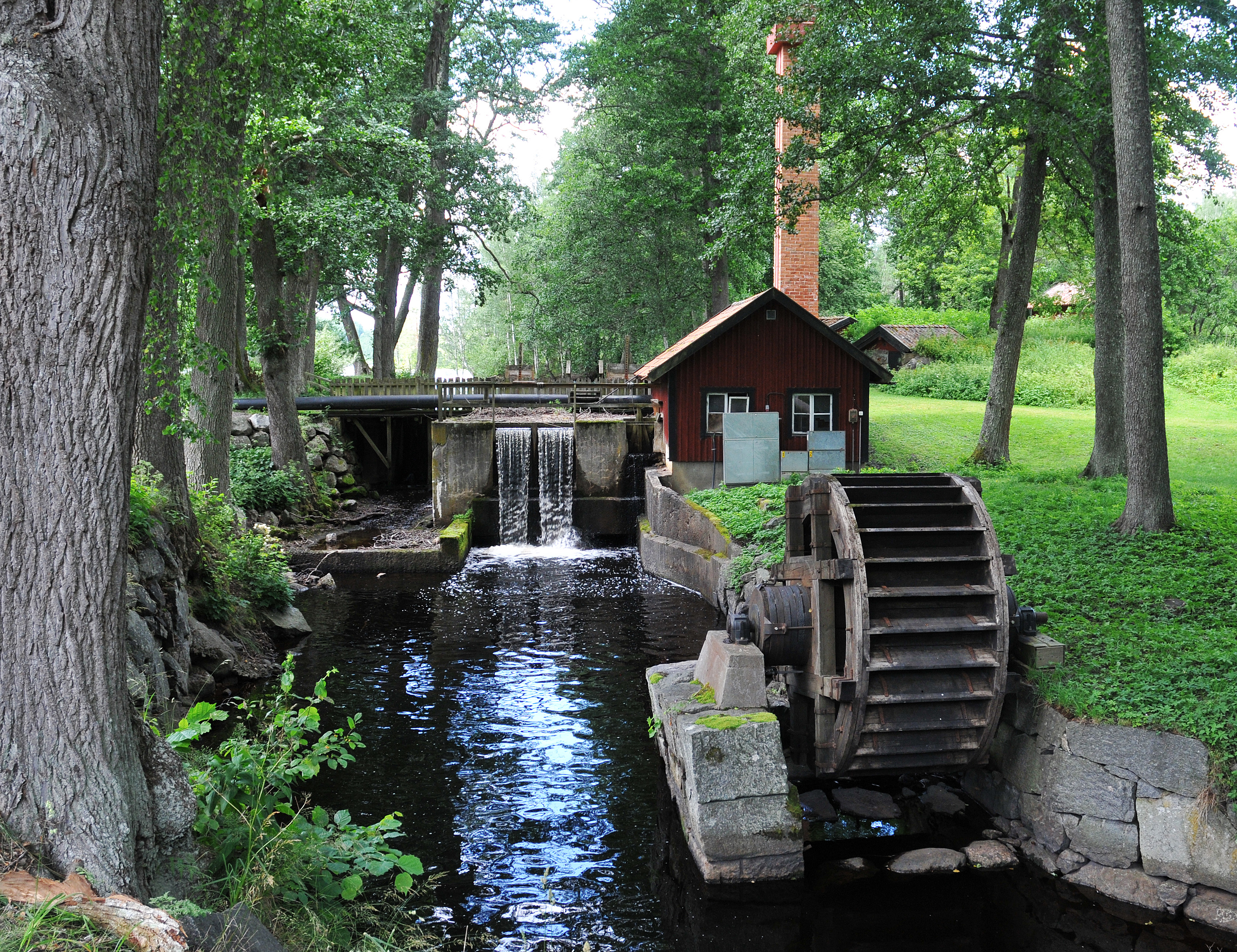 Rekonstruktion av underfallsvattenhjul vid Virå bruk, Katrineholms kommun.